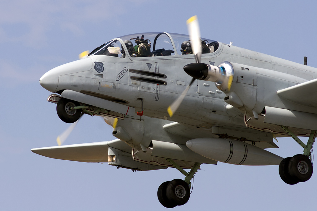 Argentinian Pucara taking off